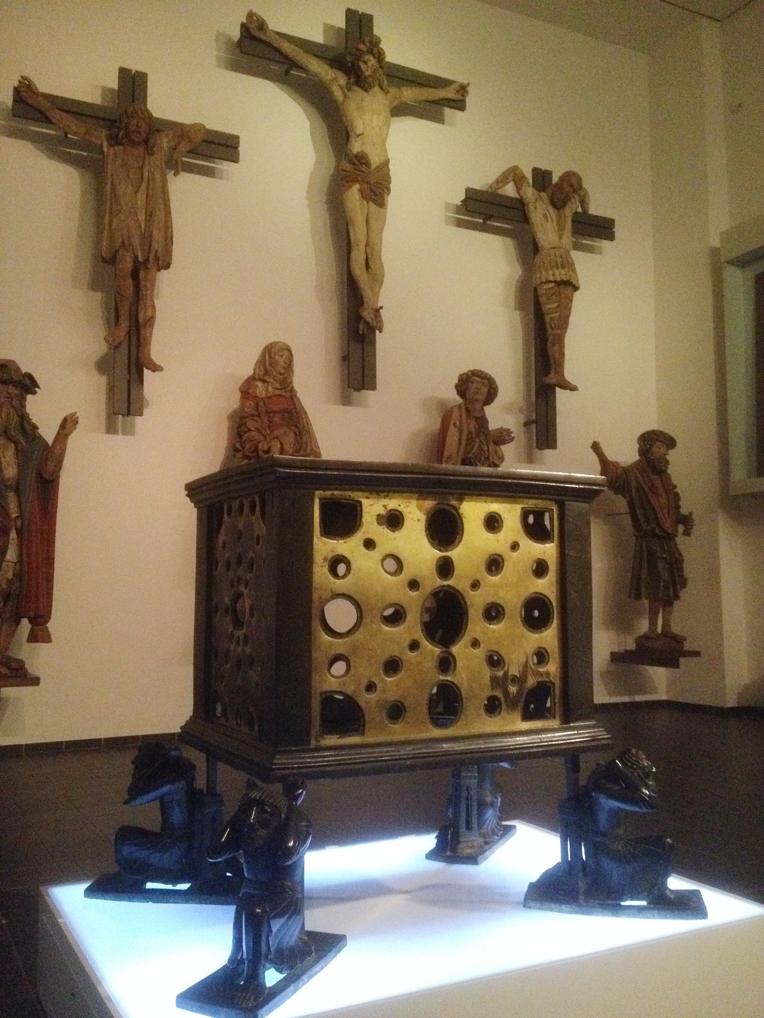 Krodoaltar